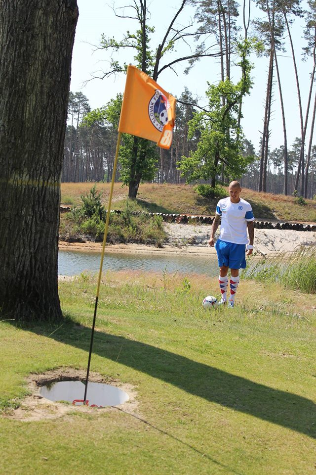 FootGolf si vyskúšal aj slovenský futbalový reprezentant Martin Škrtel.